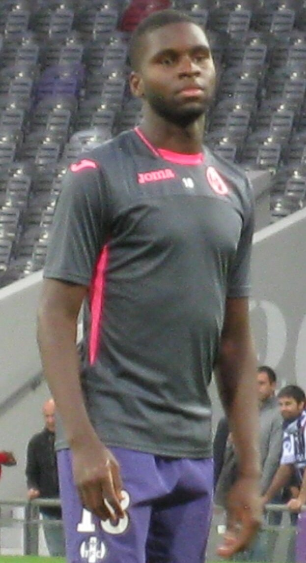 Odsonne Édouard, attaquant an prêt au TFC, à l'échauffement au Stadium de Toulouse lors du match Toulouse FC-EA Guingamp comptant pour la 5ème journée de la saison 2016-2017de Ligue 1.